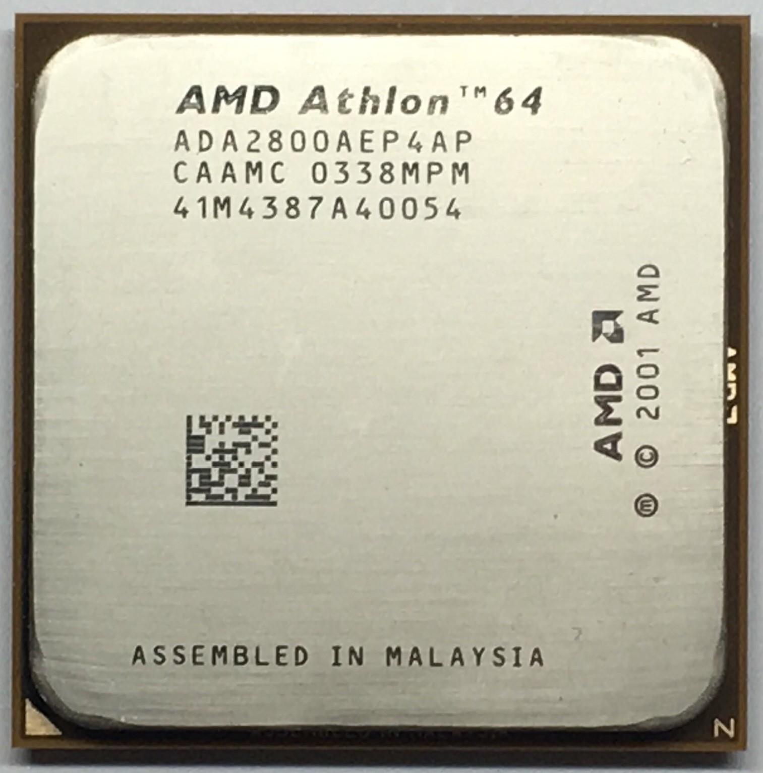 Clawhammer Athlon64 2800+ Socket754